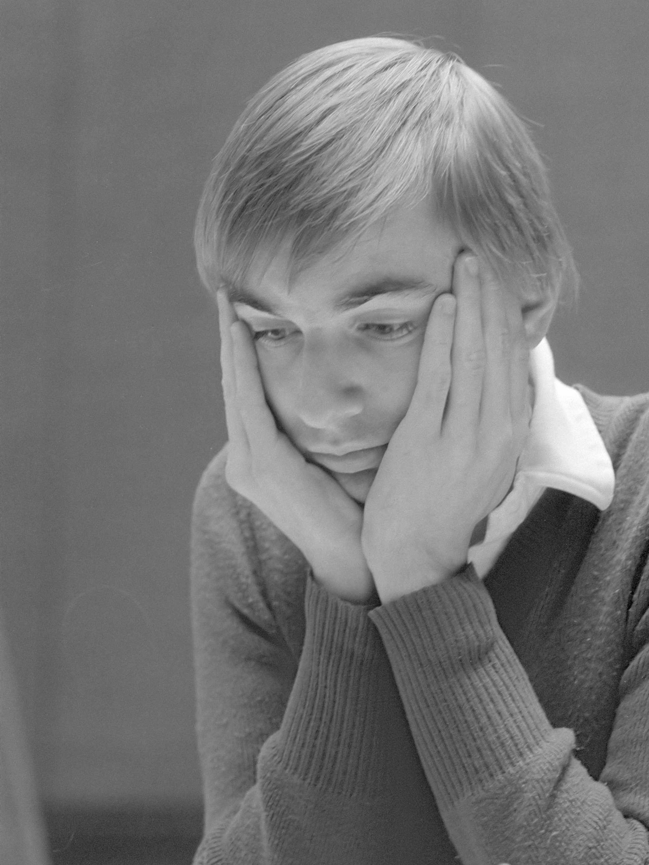 Nederlandse kampioenschappen schaken in Hilversum; Scheeren in zijn partij tegen Bohm 10 september 1984